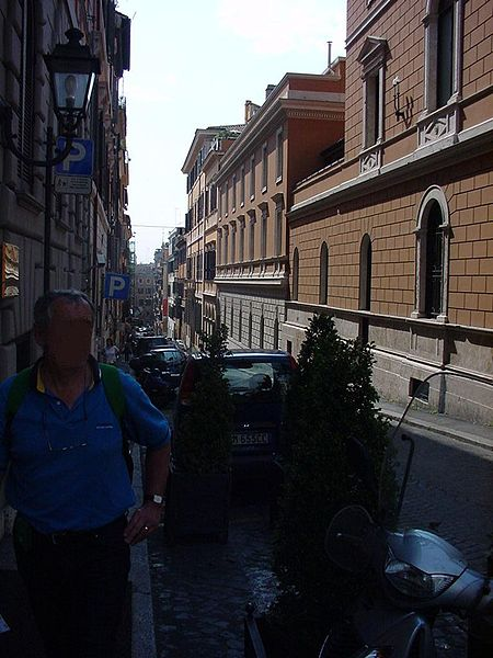 Via rasella 2007 visione di insieme autore Draco "Pasta d'uomo" Roboter Self made